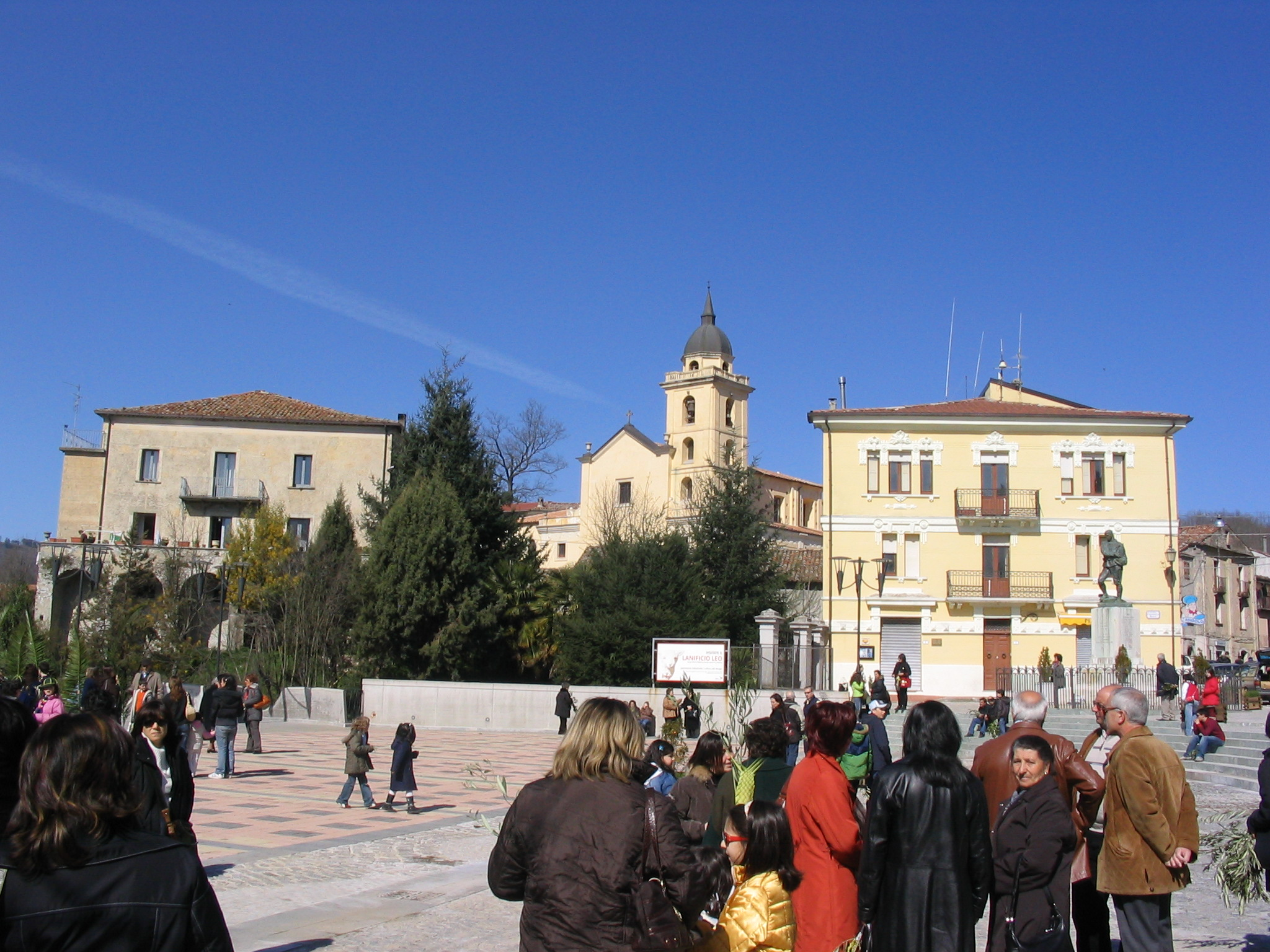 Soveria Mannelli, Palazzo e Chiesa Parrocchiale "San Giovanni Battista" da Piazza Bonini